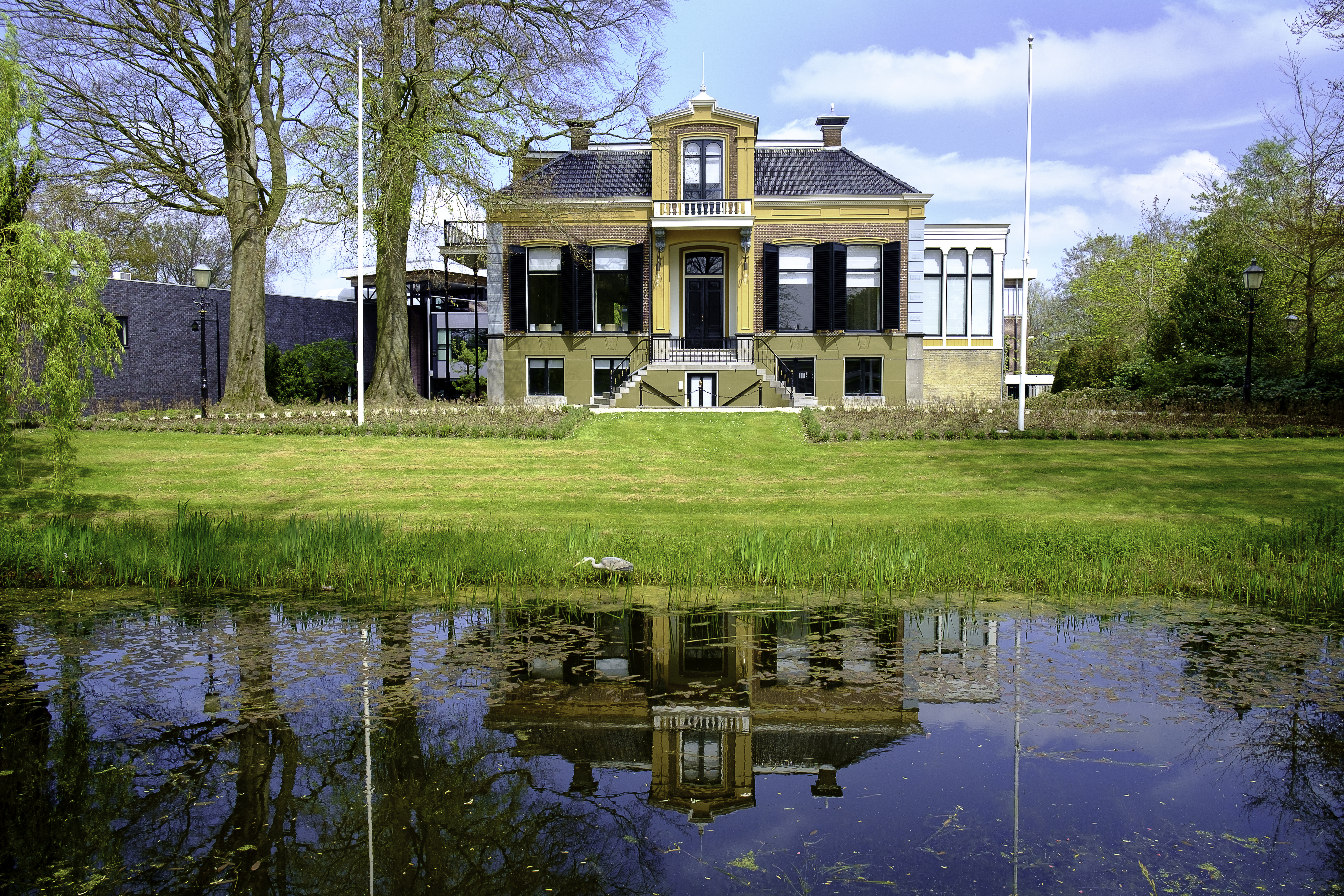 Jeltingahuis